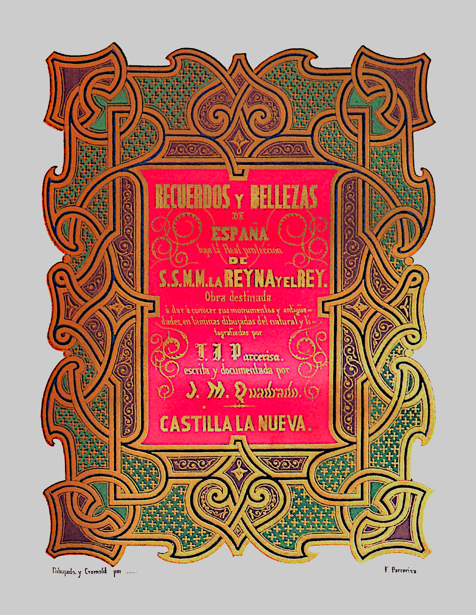 Portada del libro Recuerdos y bellezas de España correspondiente a Castilla La Nueva publicado en 1853. La litografía es de Francisco Javier Parcerisa.